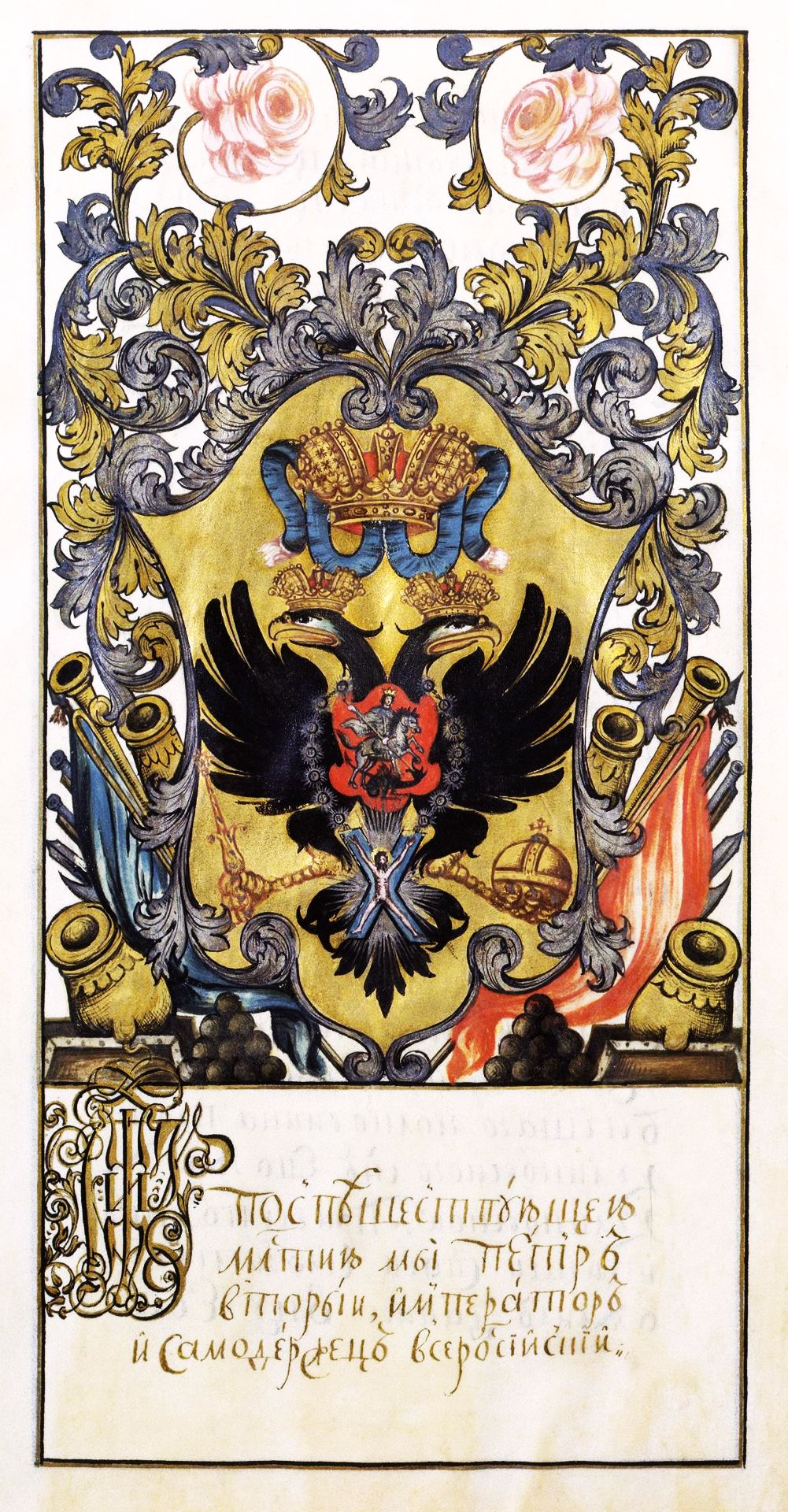 Рисунок государственного герба на жалованной грамоте императора Петра II. 1727-1728 гг. (Вилинбахов Г.В. Государственный герб России. 500 лет. СПб.: АО «Славия», 1997. - с. 83)